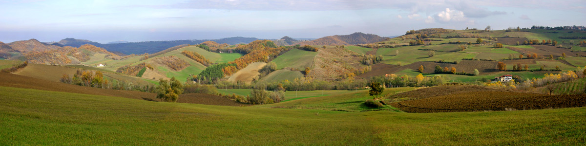 Panorama dell'Oltrepò Pavese nel territorio di Val di Nizza (PV)